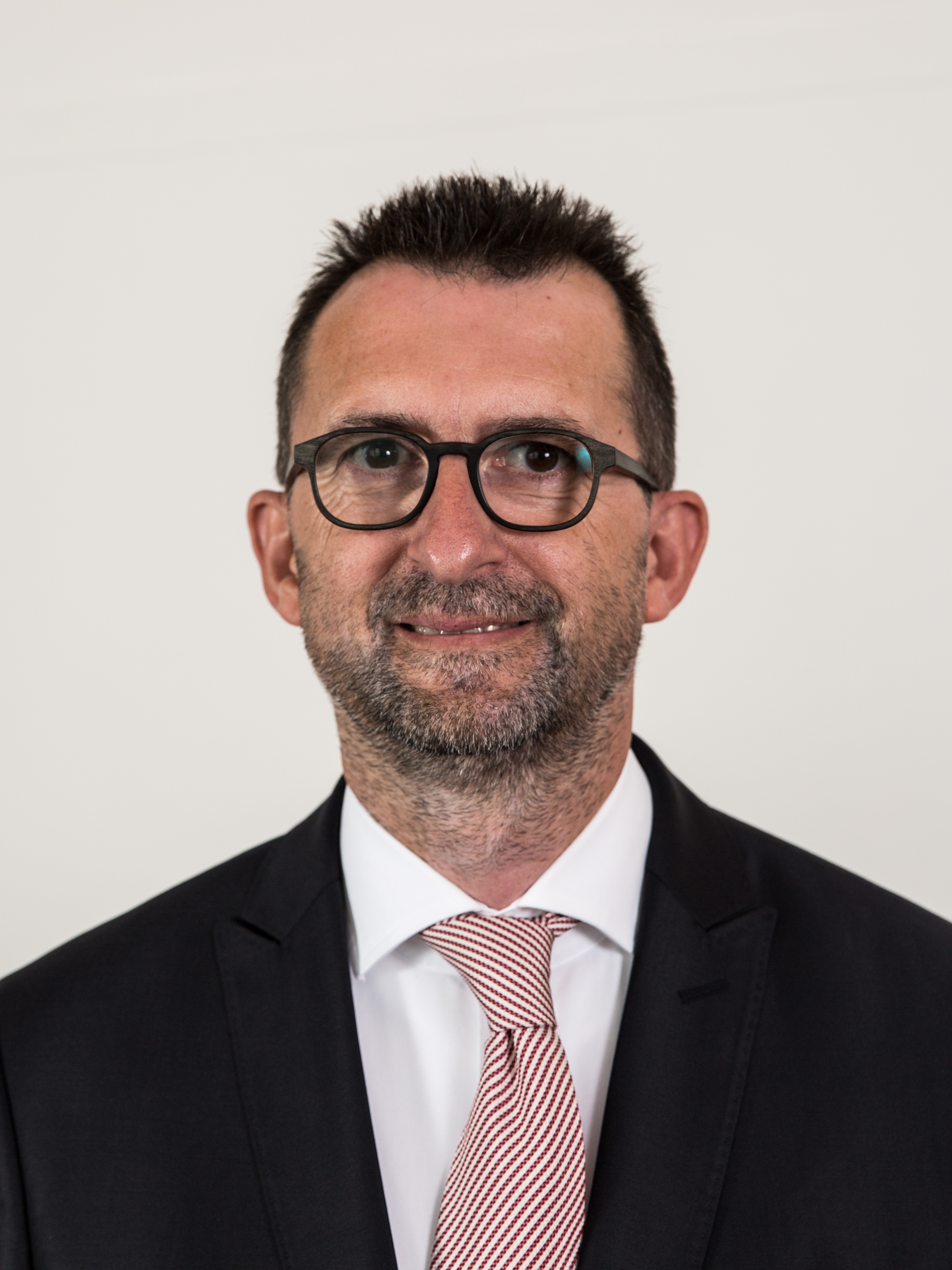 Der saarländische Minister für Umwelt und Verbraucherschutz Reinhold Jost